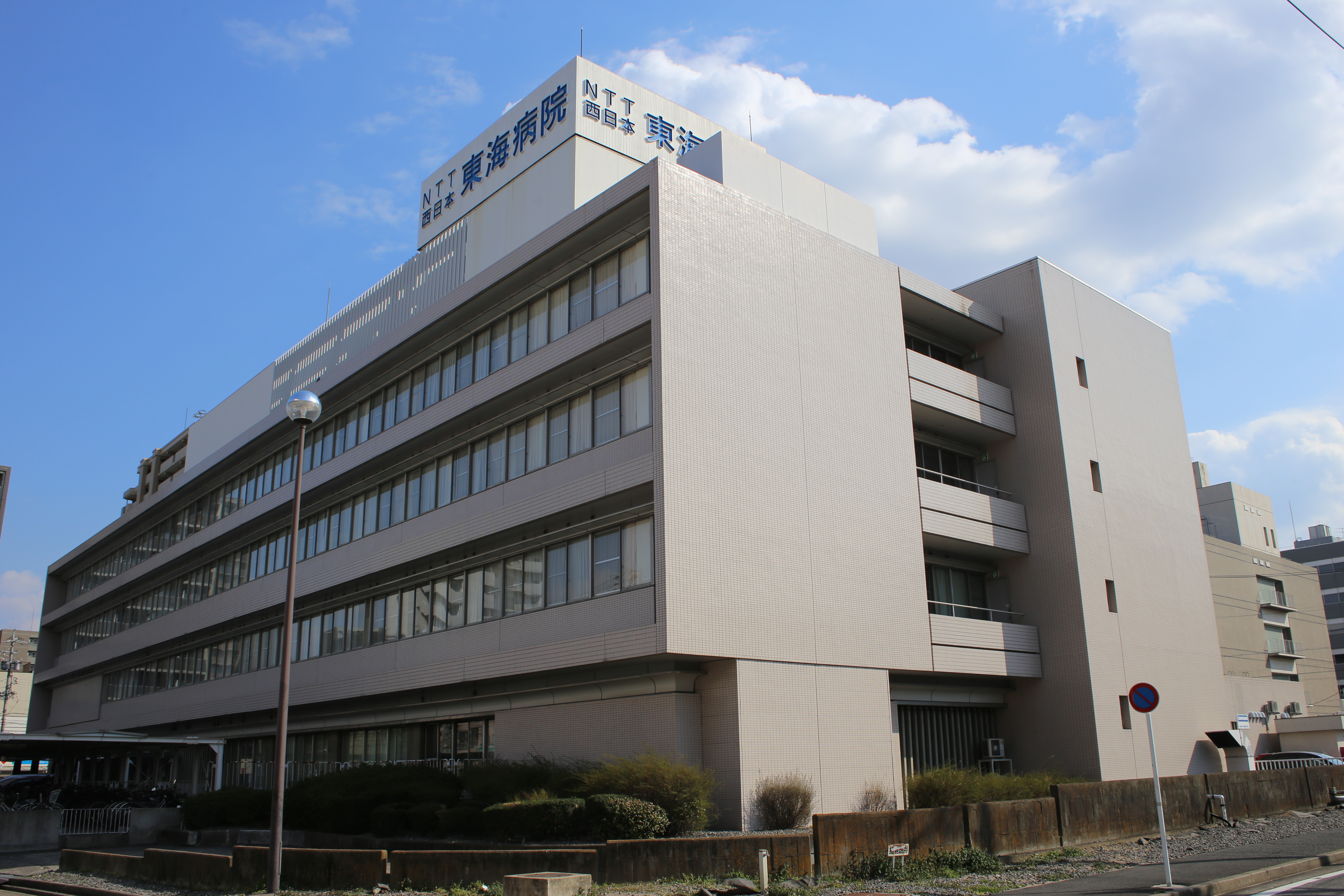 名古屋市中区松原のNTT西日本東海病院